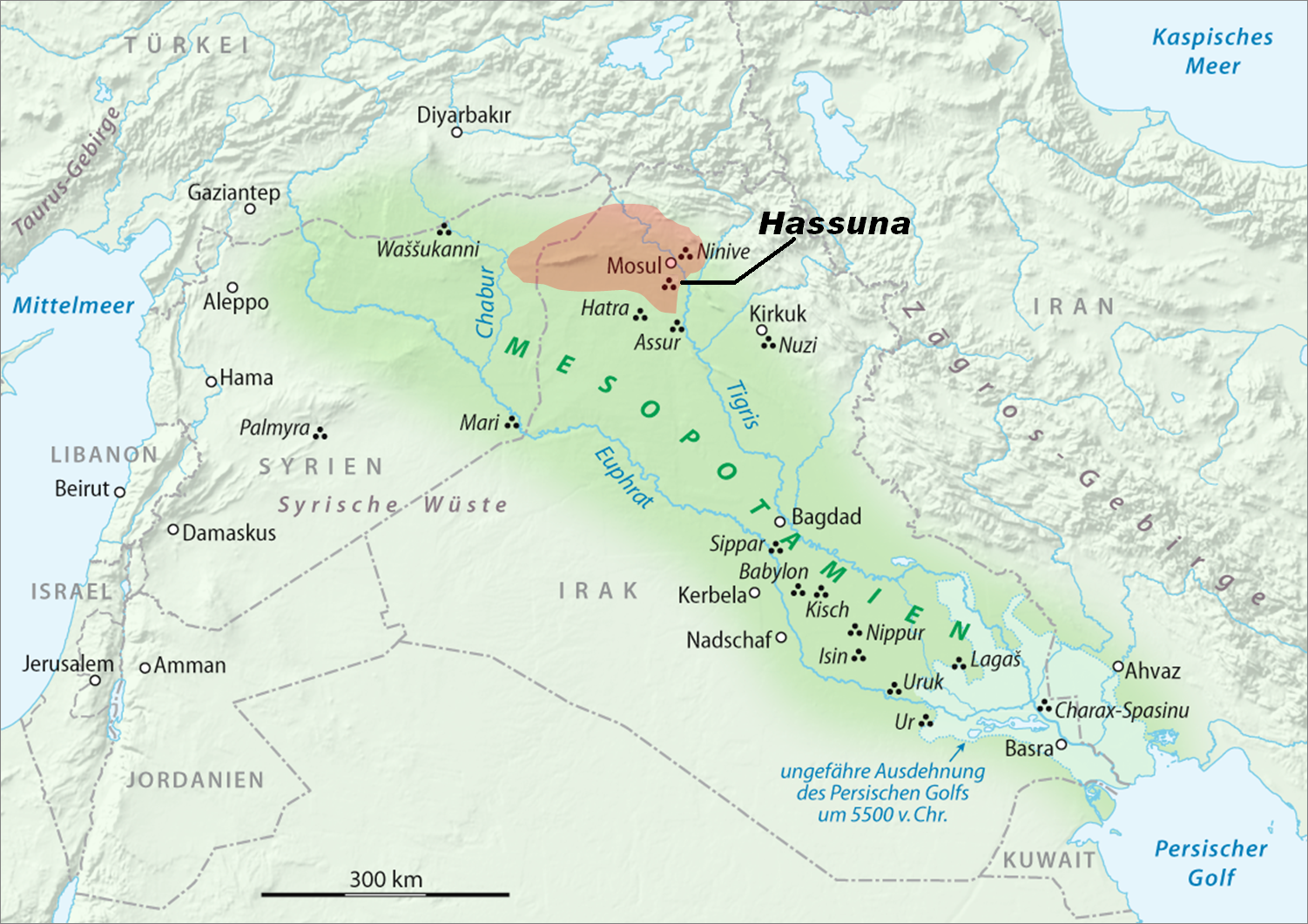 Verbreitungsgebiet der Hassuna-Kultur in Mesopotamien